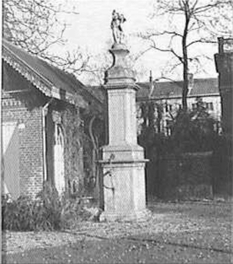 Christoffelpomp: christoffelpomp (opmerking: Deze afbeelding hebben wij helaas alleen in deze lage resolutie.)